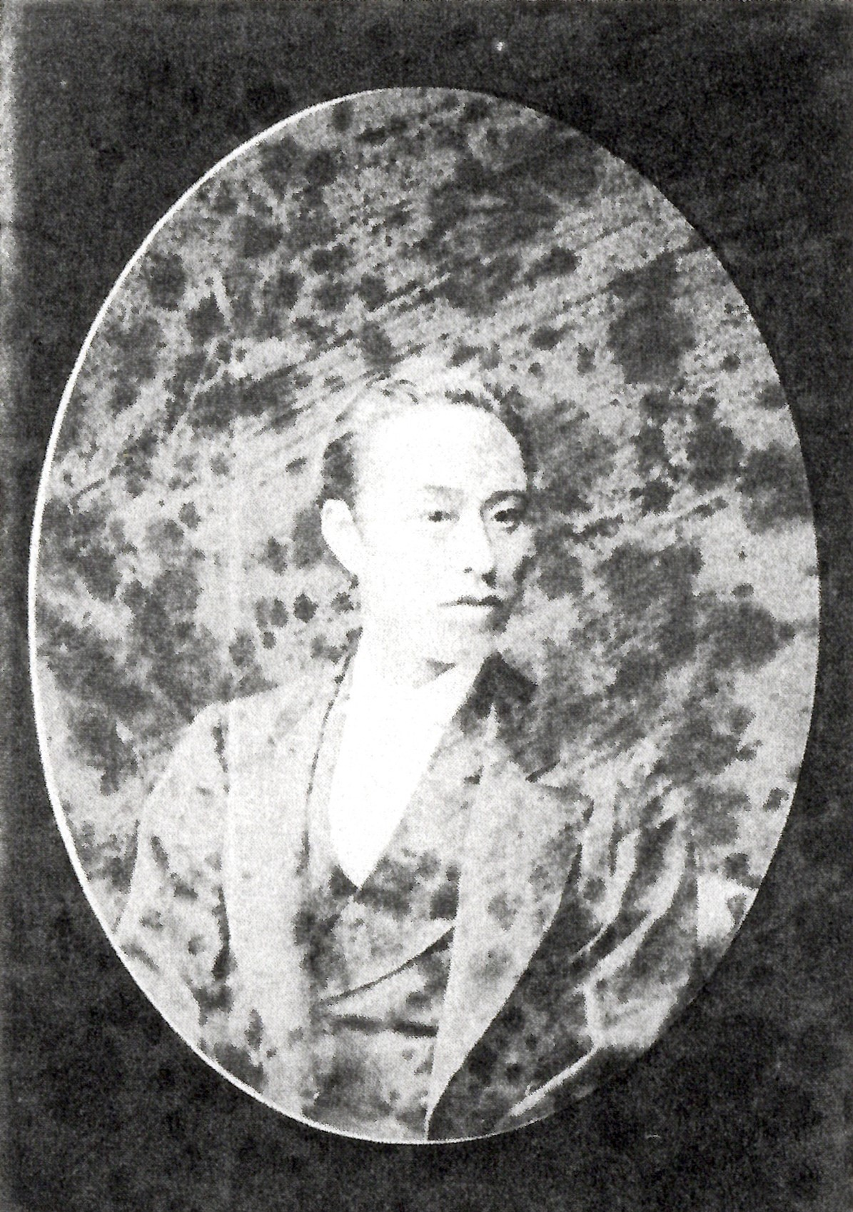 池田徳定の肖像写真。